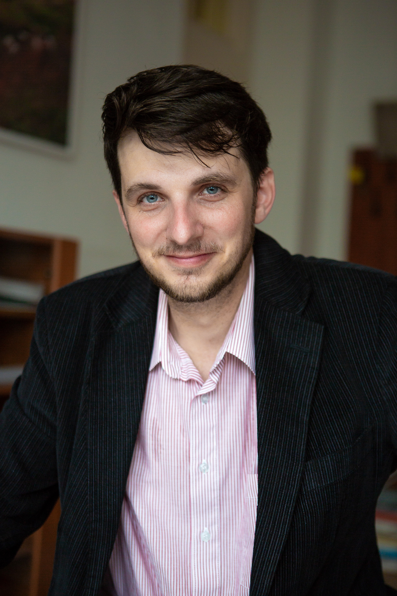 Geograf Jan D. Bláha na Přírodovědecké fakultě UJEP v červnu 2018